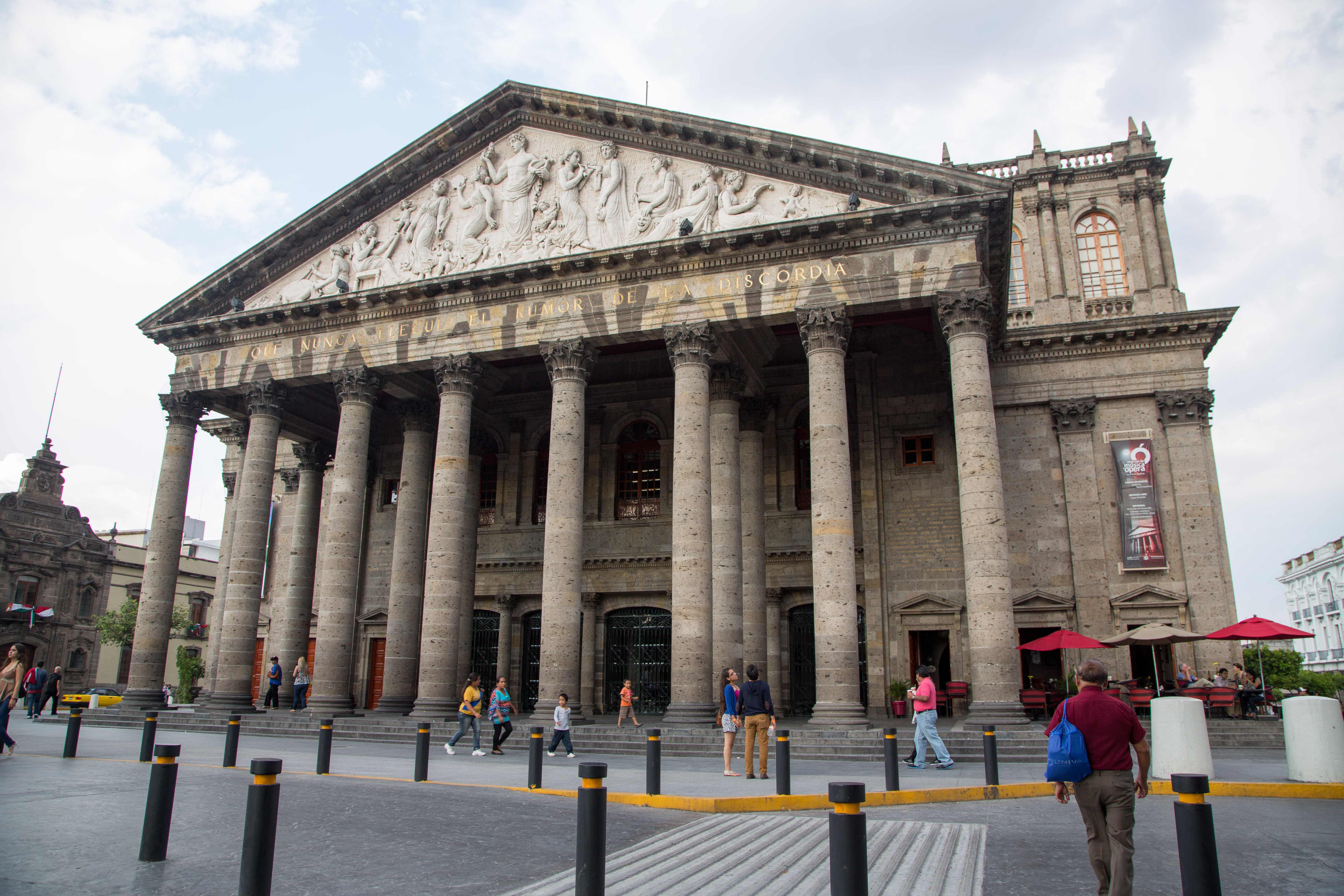 teatro degollado